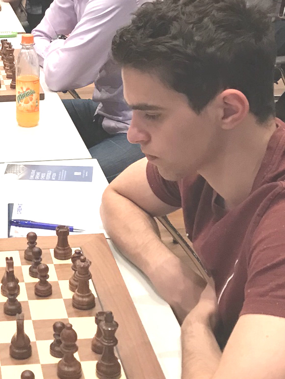 Christopher Repka, Runde 9 der Grenke Chess Open 2019 in Karlsruhe.